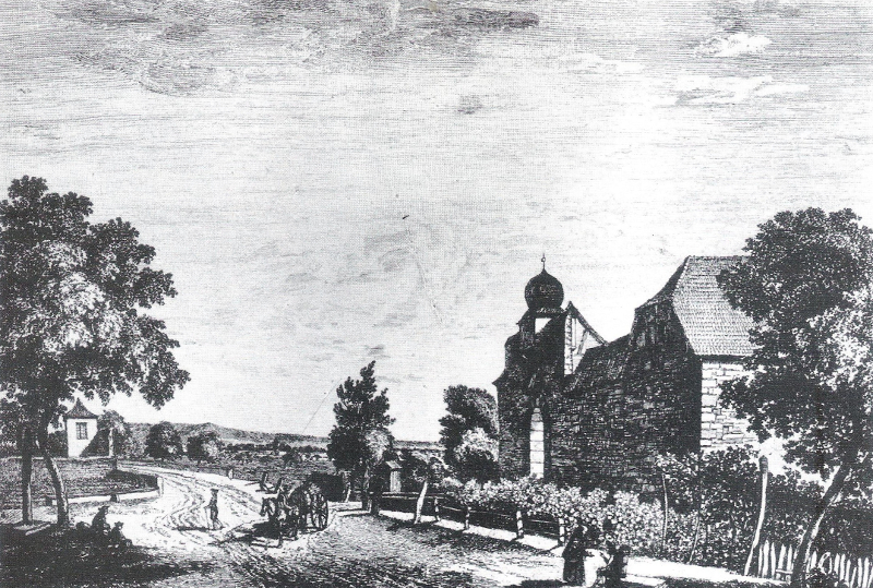 Das nördliche Stadttor der Stadtbefestigung Deidesheims (mittlerweile abgerissen). Links ist das Jordansche Gartenhäuschen, es steht heute noch beim Anwesen mit der Adresse Weinstraße 5. Zeichnung von H. Thierry aus dem Jahr 1796.